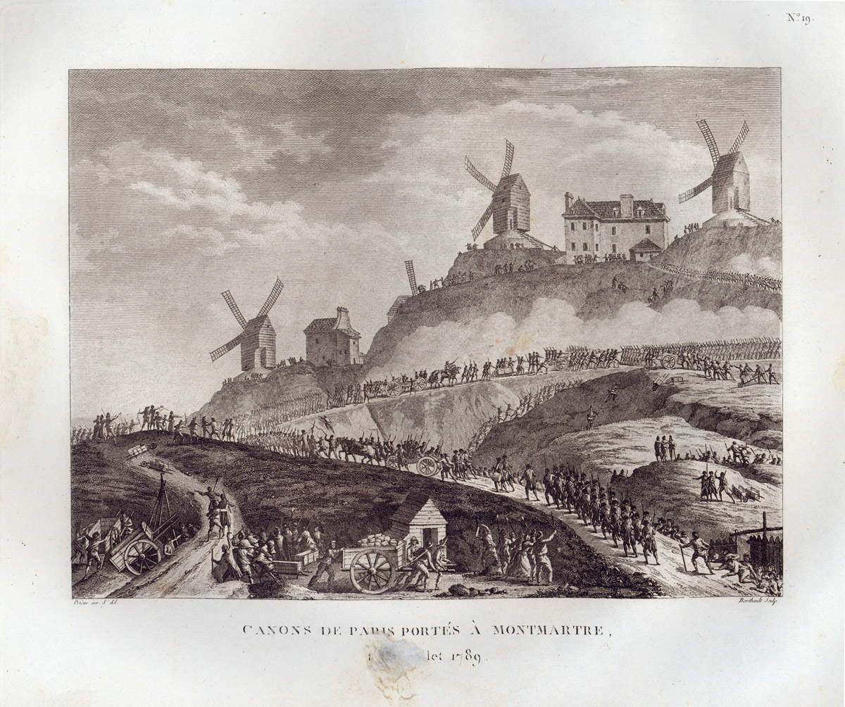 Canons de Paris portés à Montmartre, le 15 juillet 1789.